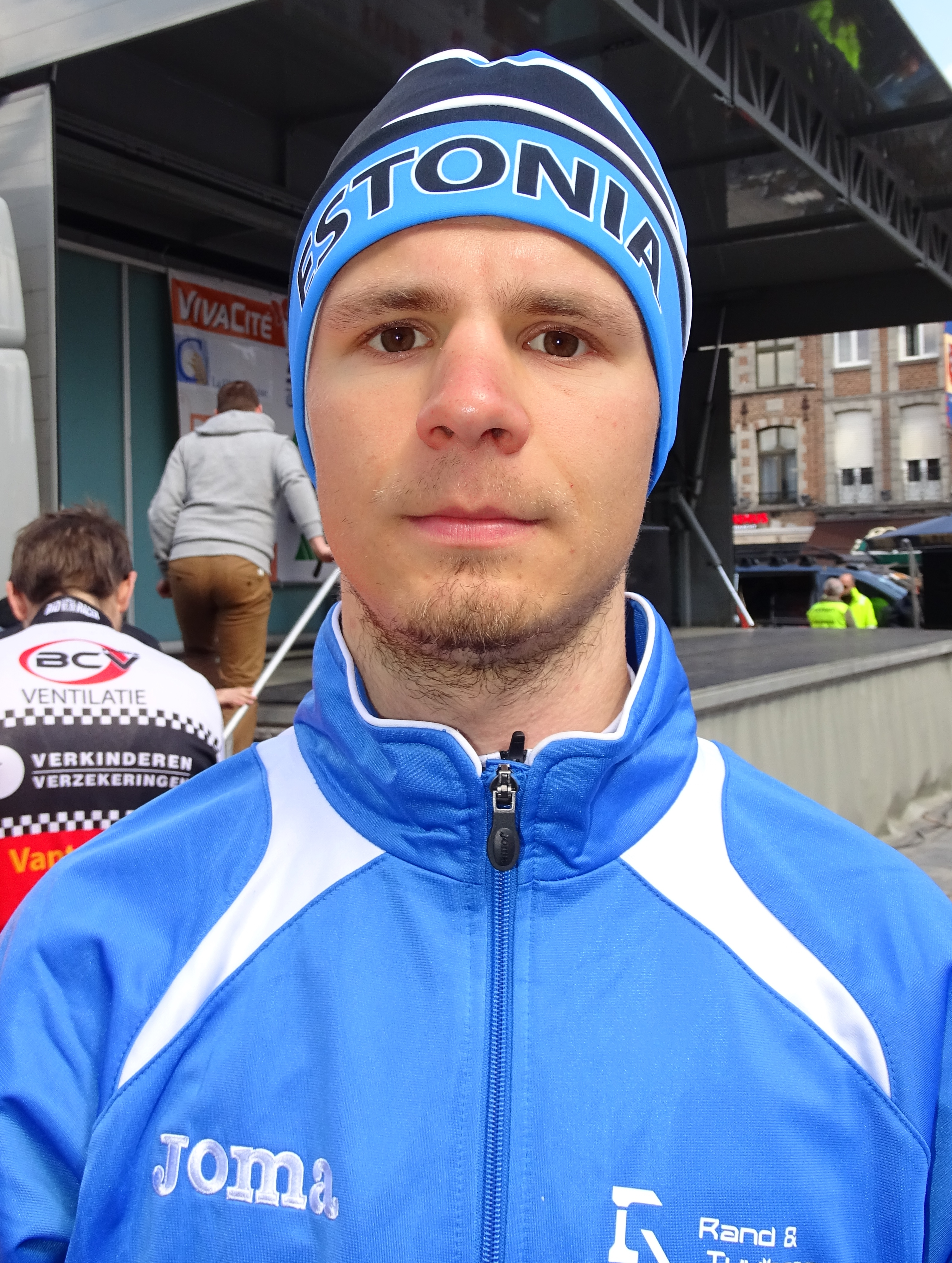 Triptyque des Monts et Châteaux 2015 Depicted person: Mihkel Räim Depicted team: Équipe nationale d'Estonie espoirs